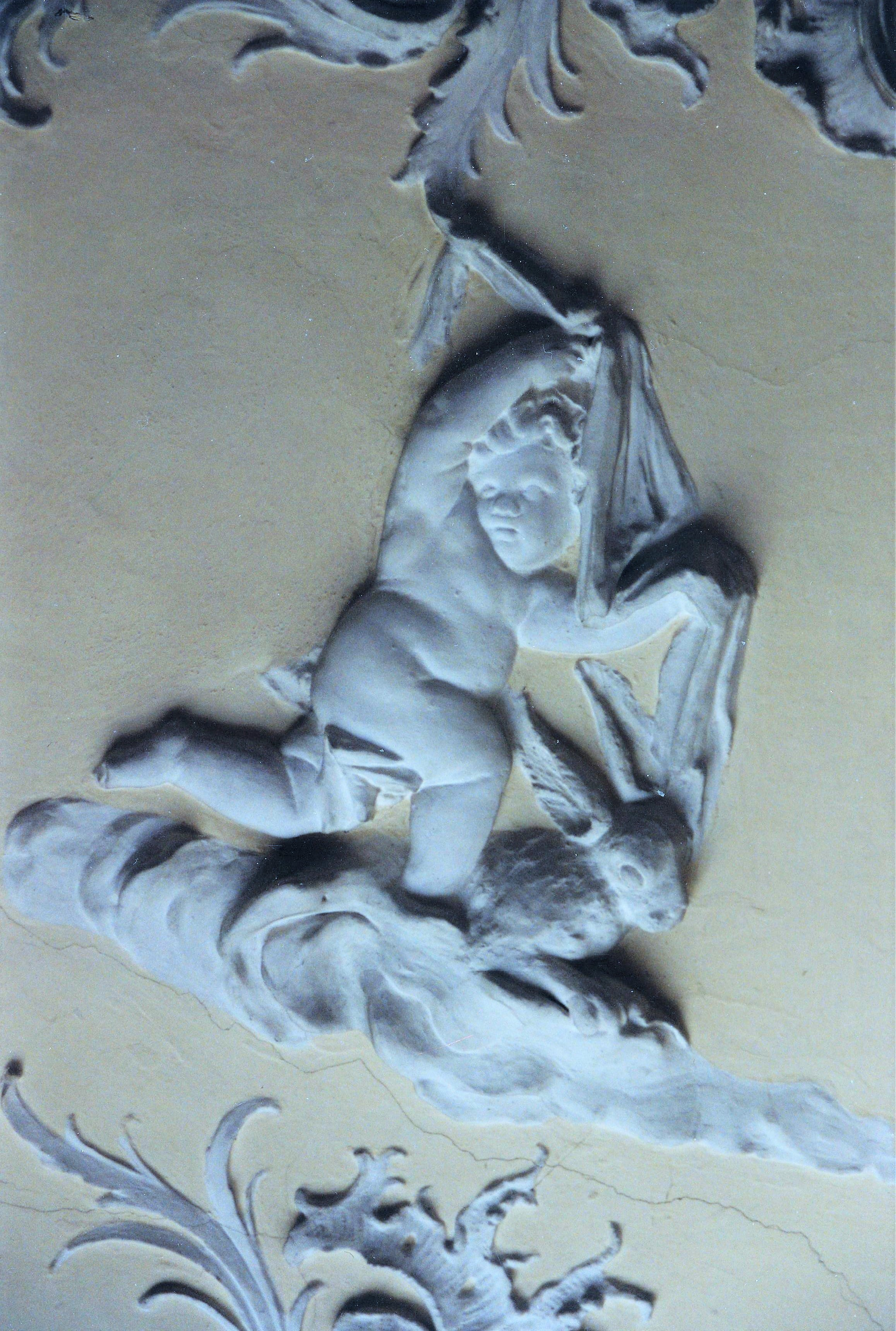 Kloster Oberzell, Stuckdekoration von Antonio Bossi in der Sakristei – 7 Gaben des Heiligen Geistes: Geist der Gottesfurcht (Spiritus timoris Domini)